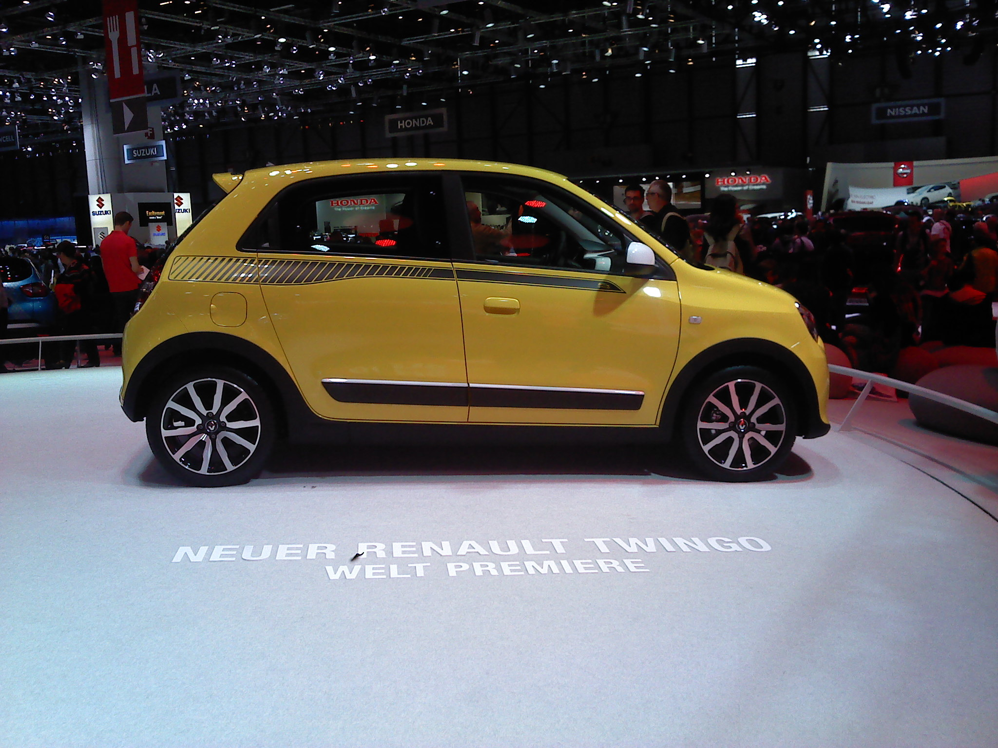 Salon de Genève 2014-Twingo III